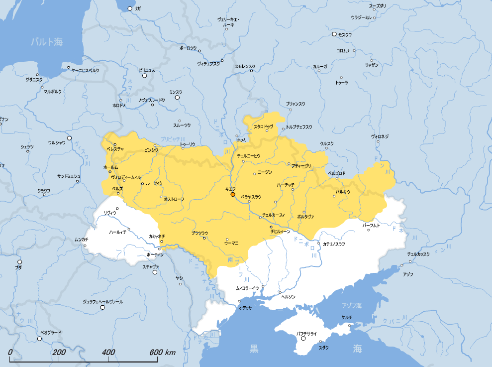 Мала Русь (Малоросія)